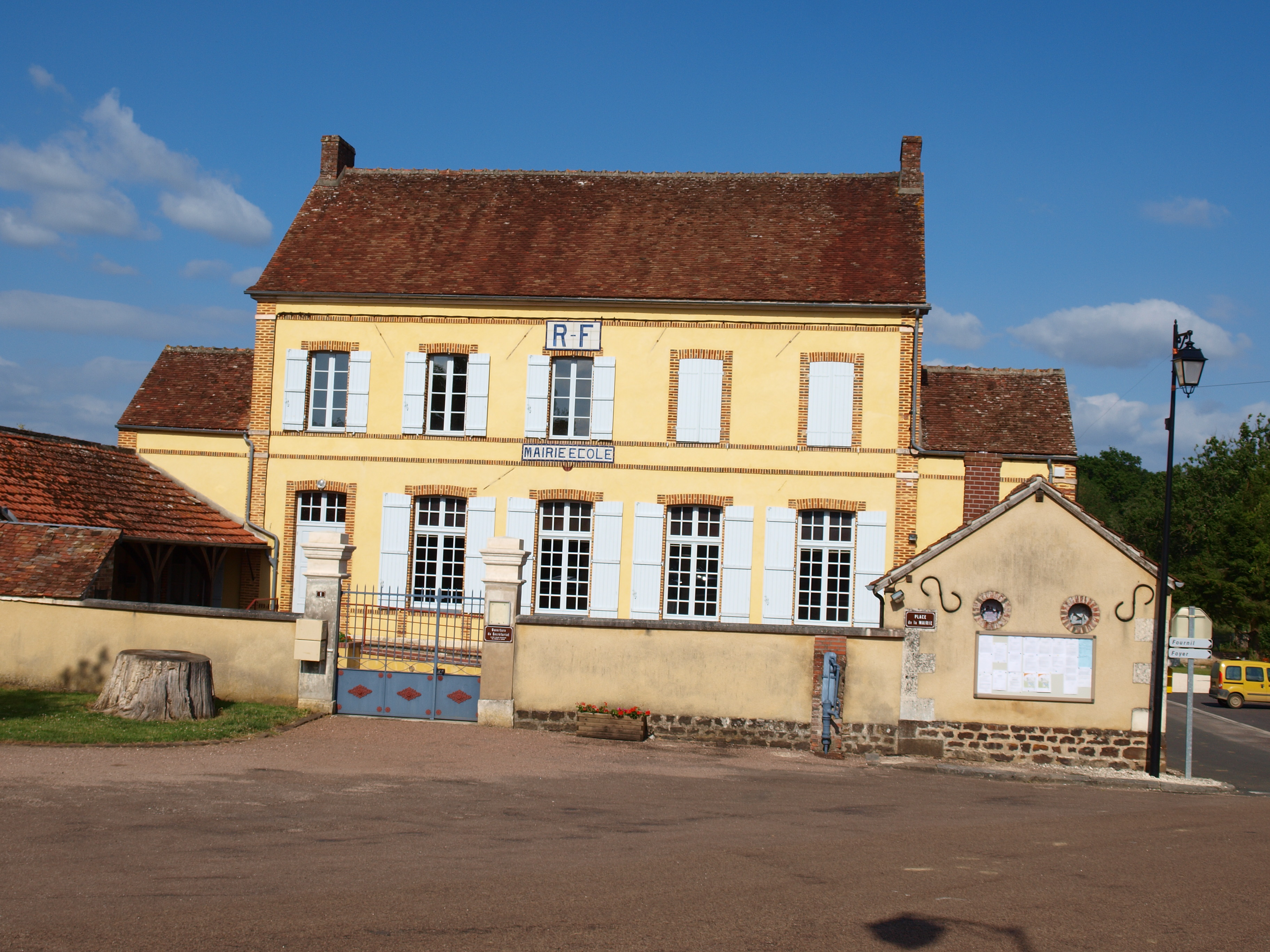 Moutiers-en-Puisaye (Yonne, France) ; mairie